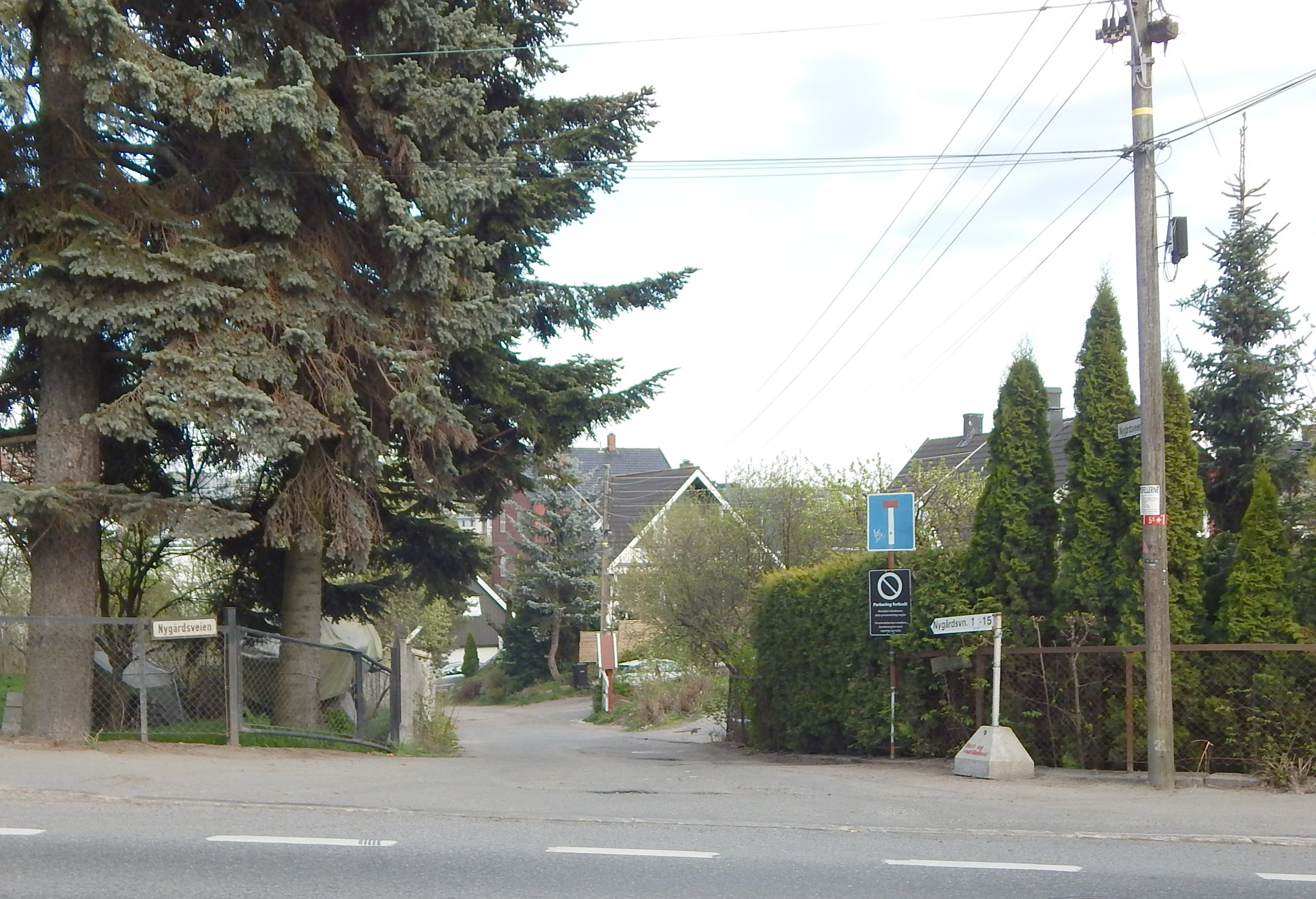 Nygårdsveien sett fra Maridalsveien